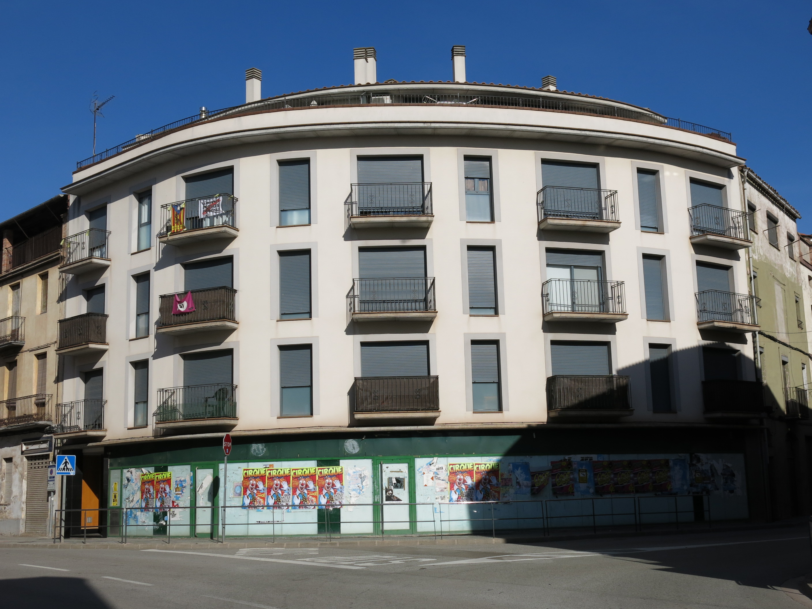 La Cooperativa (Artés)